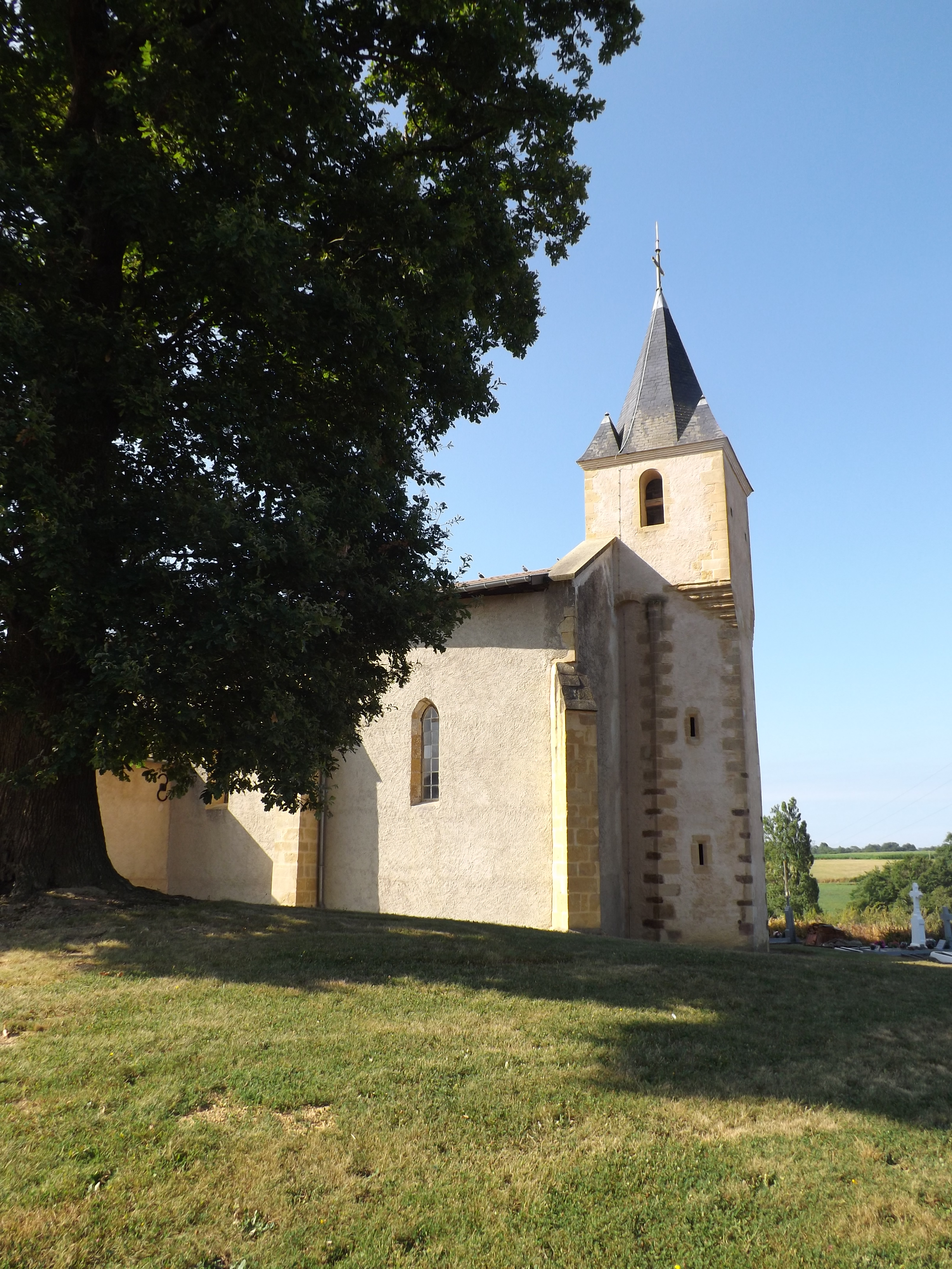 Glèisa de Pèira, Lanas, Gasconha